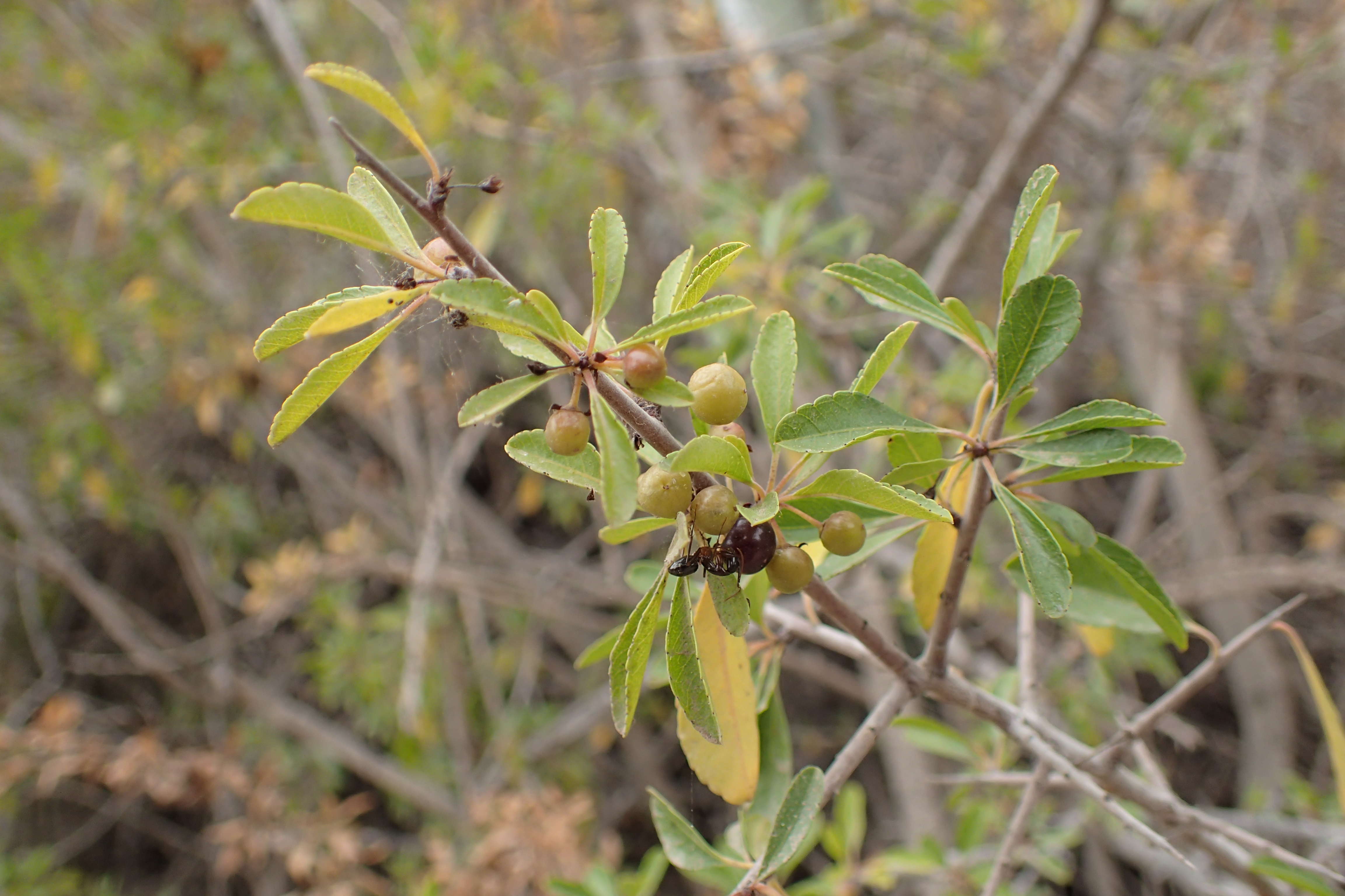 Rhamnus crenulata in Barranco Inferno, Tenerife, Canarias